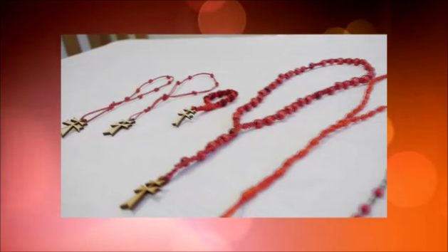 Koronki ręcznie wykonane